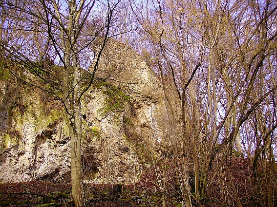 Blick vom Geo-Pfad hoch zur Ruine Dreimühlen. Namensgeberin für den naheliegenden Wasserfall Dreimühlen.